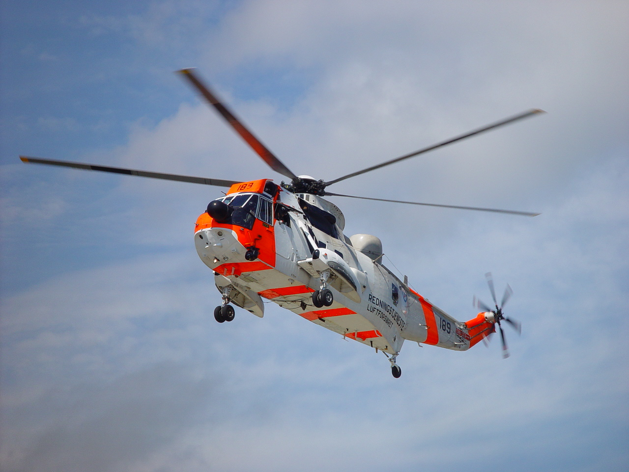 Sea King helikopter